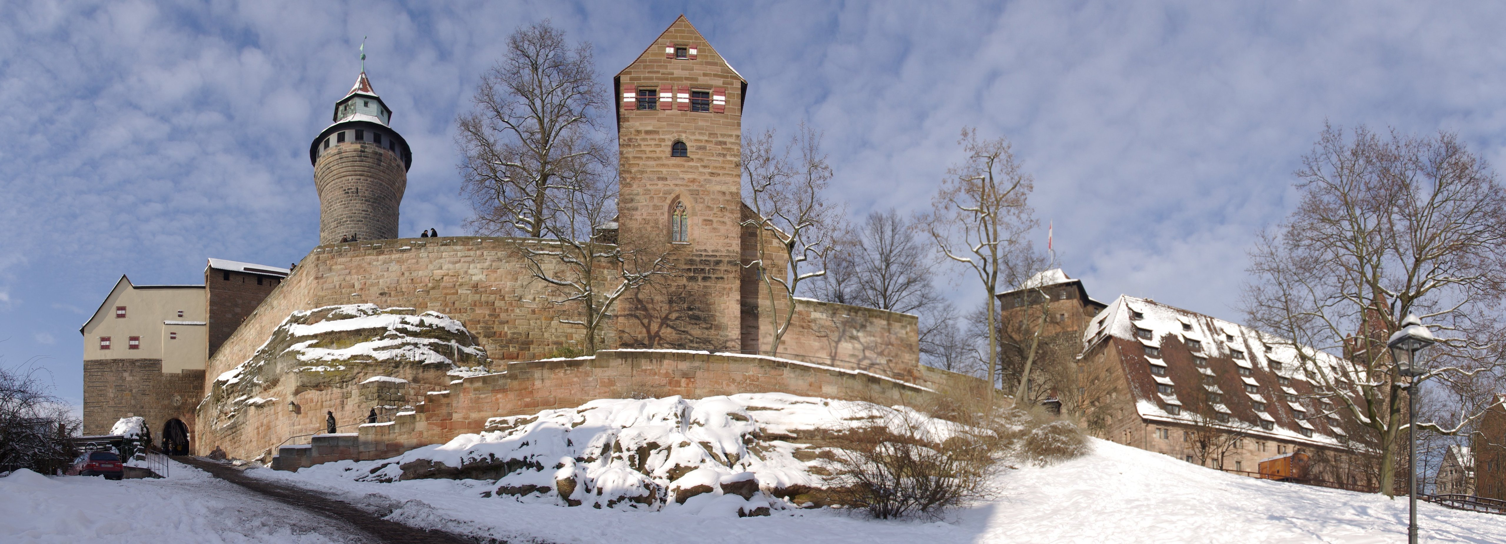 Panorama der Nürnberger Burg aus südostlicher Richtung. Links das Himmelstor unter der Hasenburg, halblinks der Sinwellturm, in der Mitte der Chorturm der Otmars- und Walburgiskapelle. Halbrechts der Fünfeckturm mit der Flagge der Stadt, rechts daneben die Kaiserstallung und rechts (hinter der Laterne) der Luginsland.